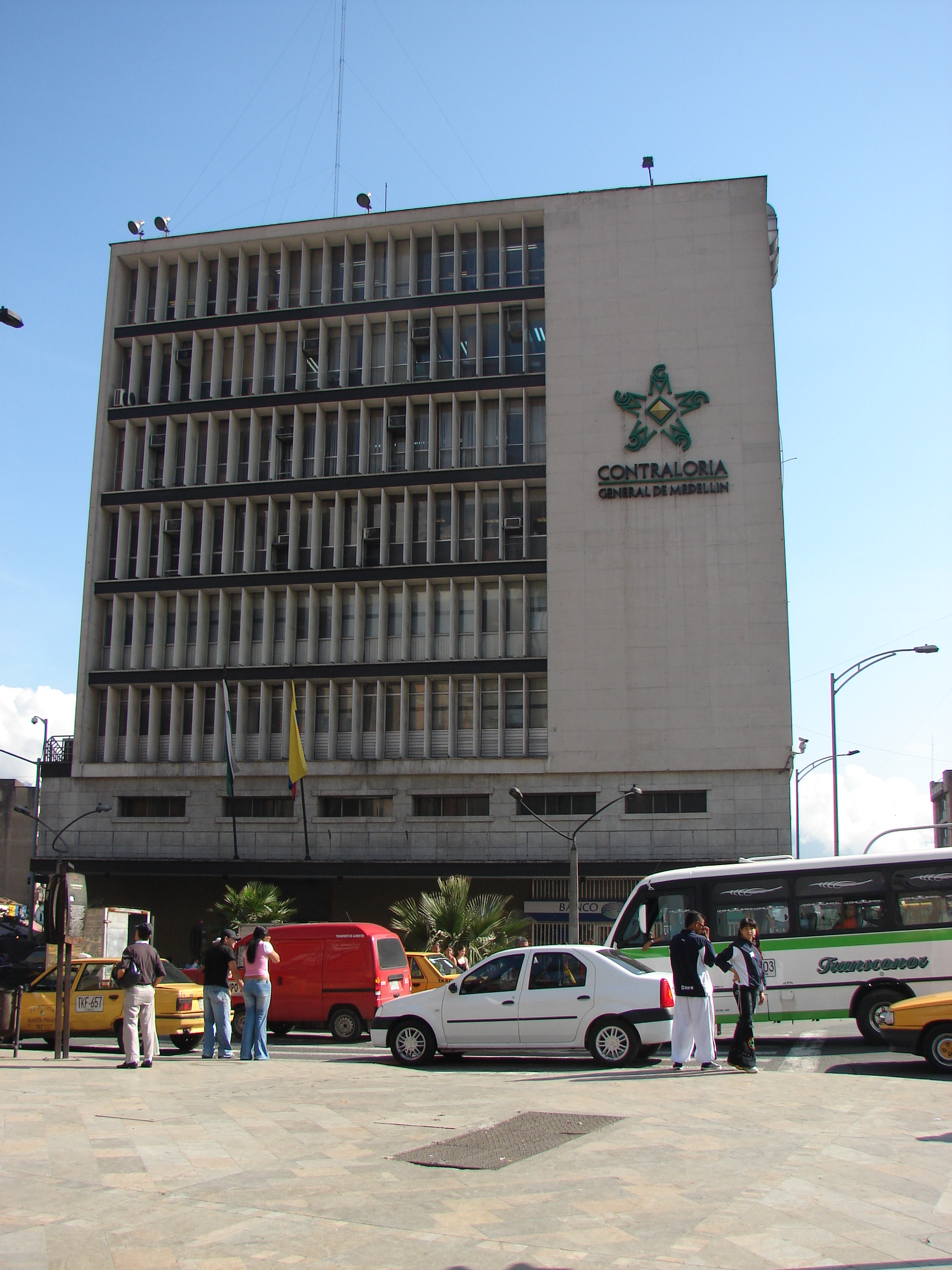 Edificio Miguel de Aguinaga, en el centro de Medellín. ColombiaMEDELLIN - ANTIOQUIA